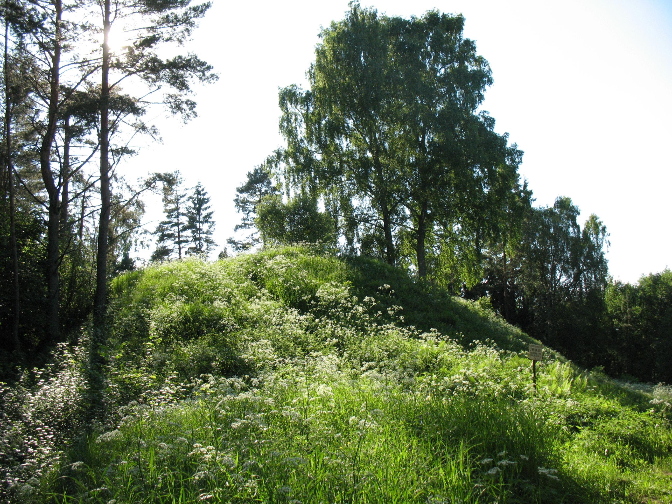 Tartu maakond, Konguta vald, Vahessaare küla